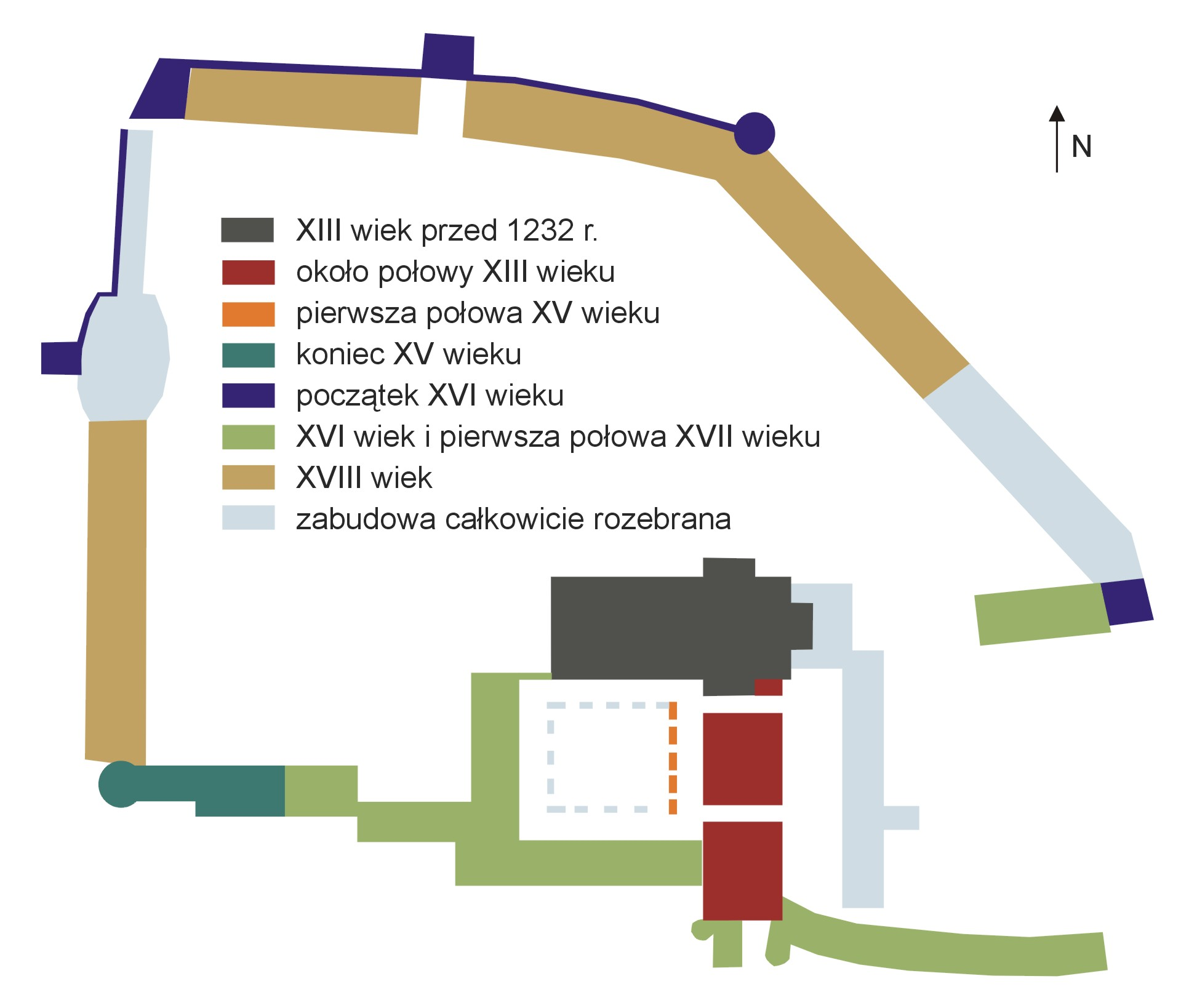 Sulejów Monastery